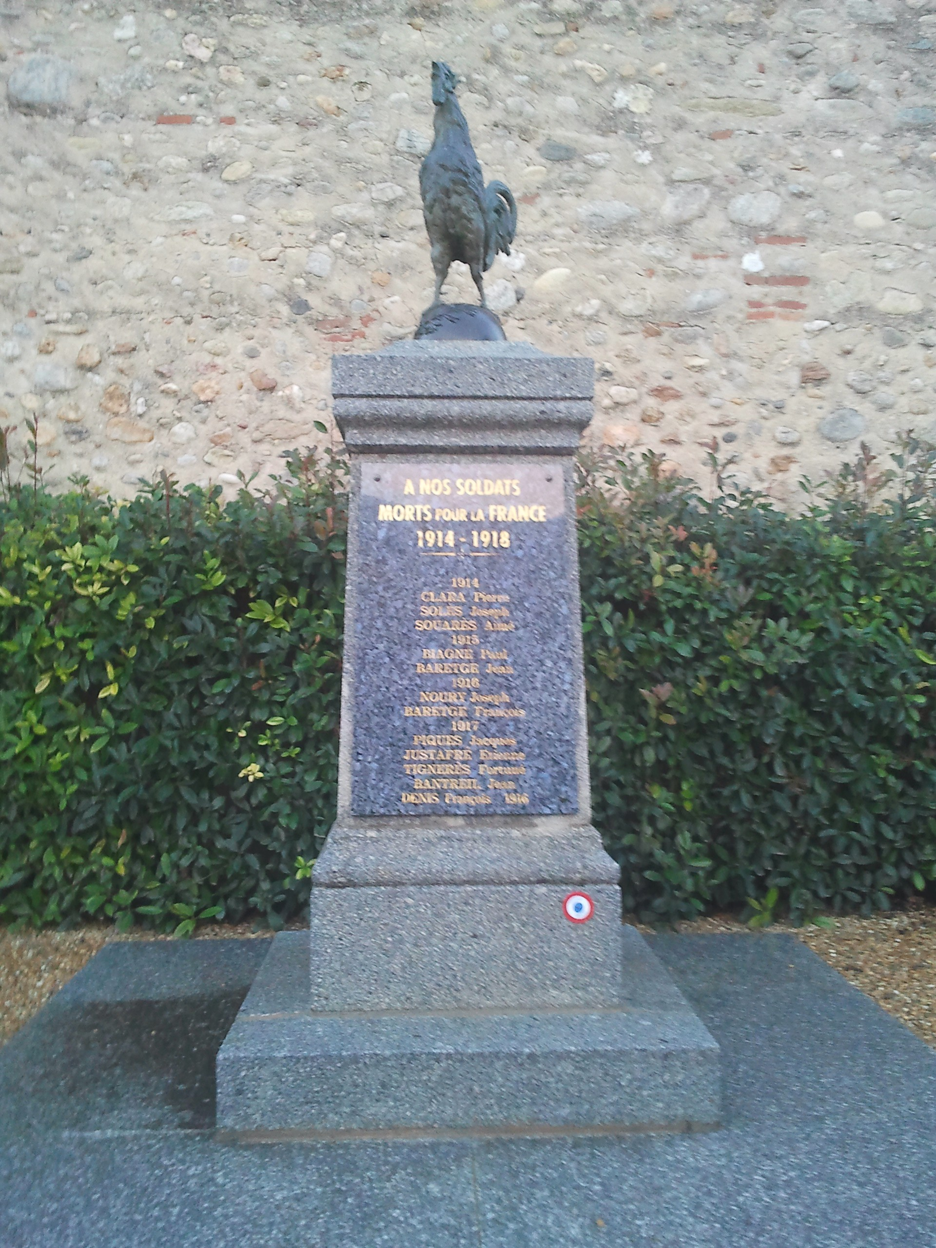 Monument aux morts de Saint-Jean-Lasseille